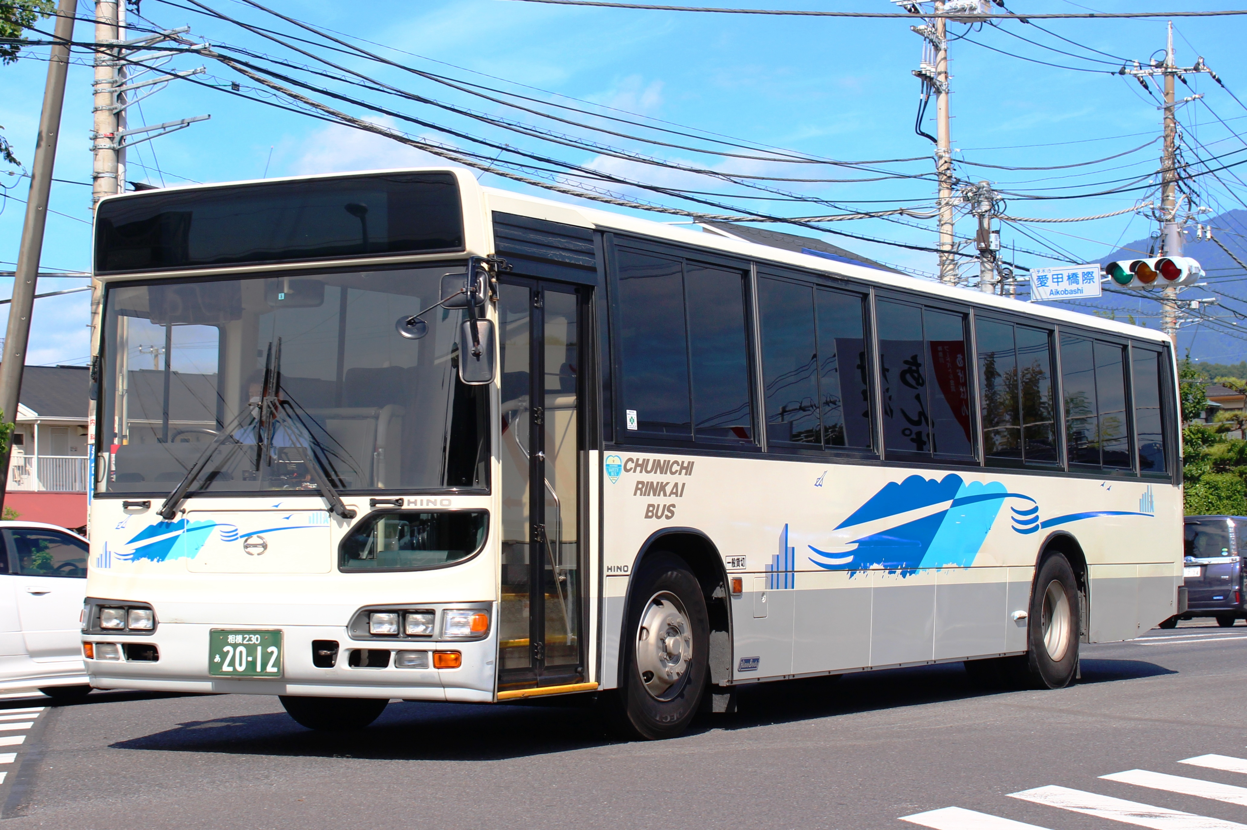 ブルーリボンシティー・ツーステップ（一般貸切）